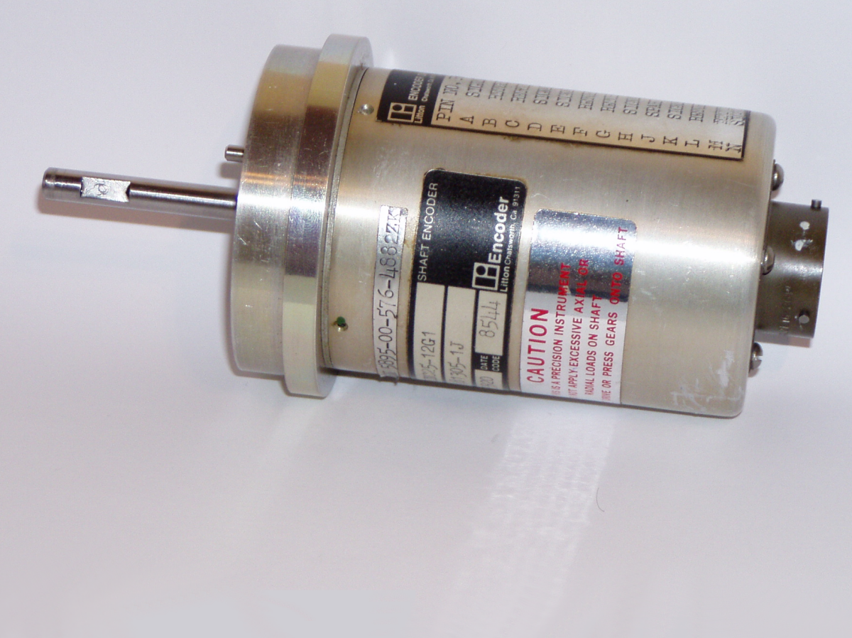 Encoder für die Drehwinkelinformation eines Flugsicherungsradargerätes